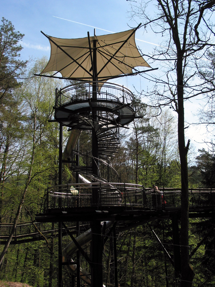 Description: Turm im Baumwipfelpfad Source: Selbst fotografiert, 30.04.2005 in Fischbach Photographer/Painter: Ralf Ziegler, --RalfZi 18:06, 3 May 2005 (UTC)